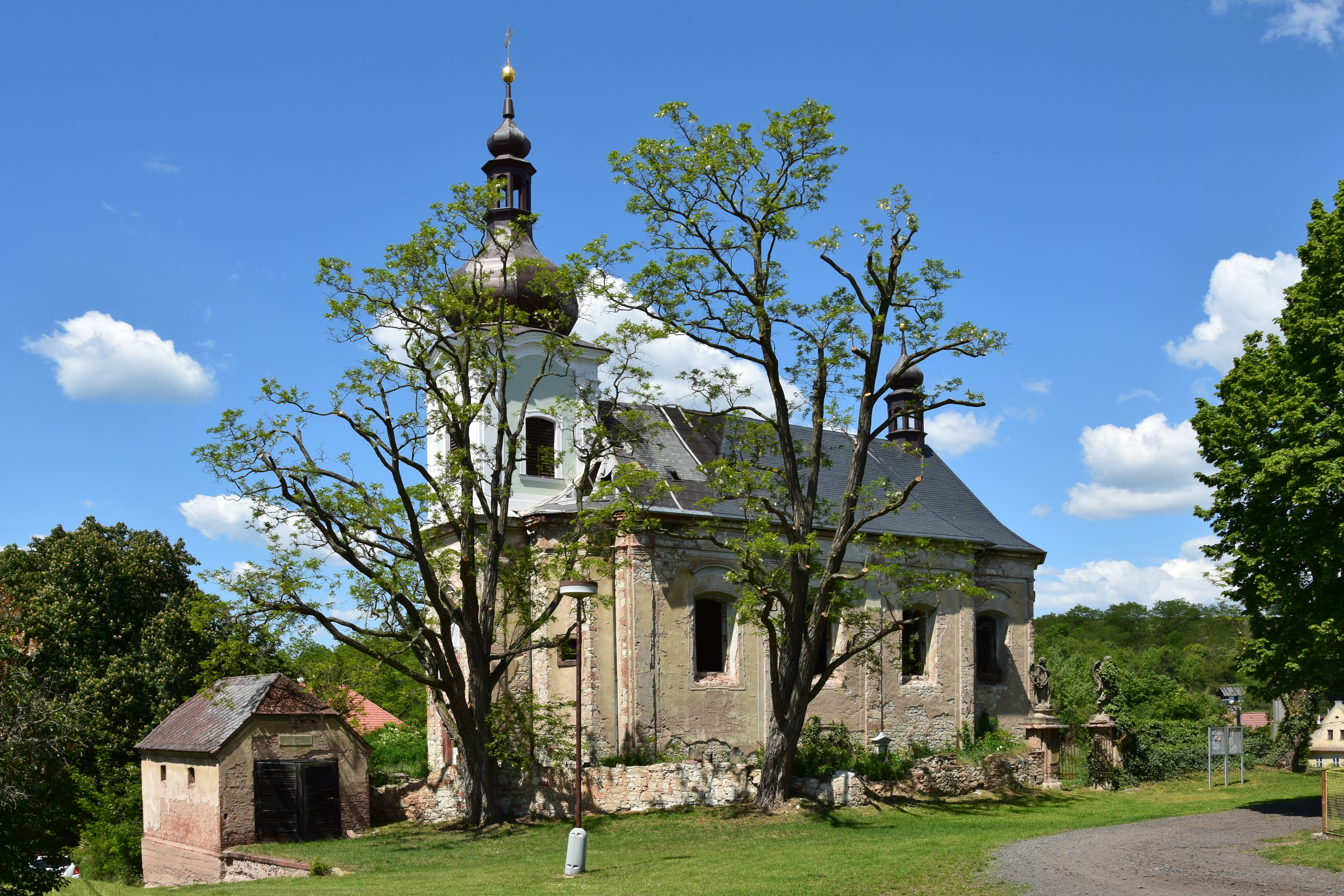 Kostel Neposkvrněného početí Panny Marie, Siřem.